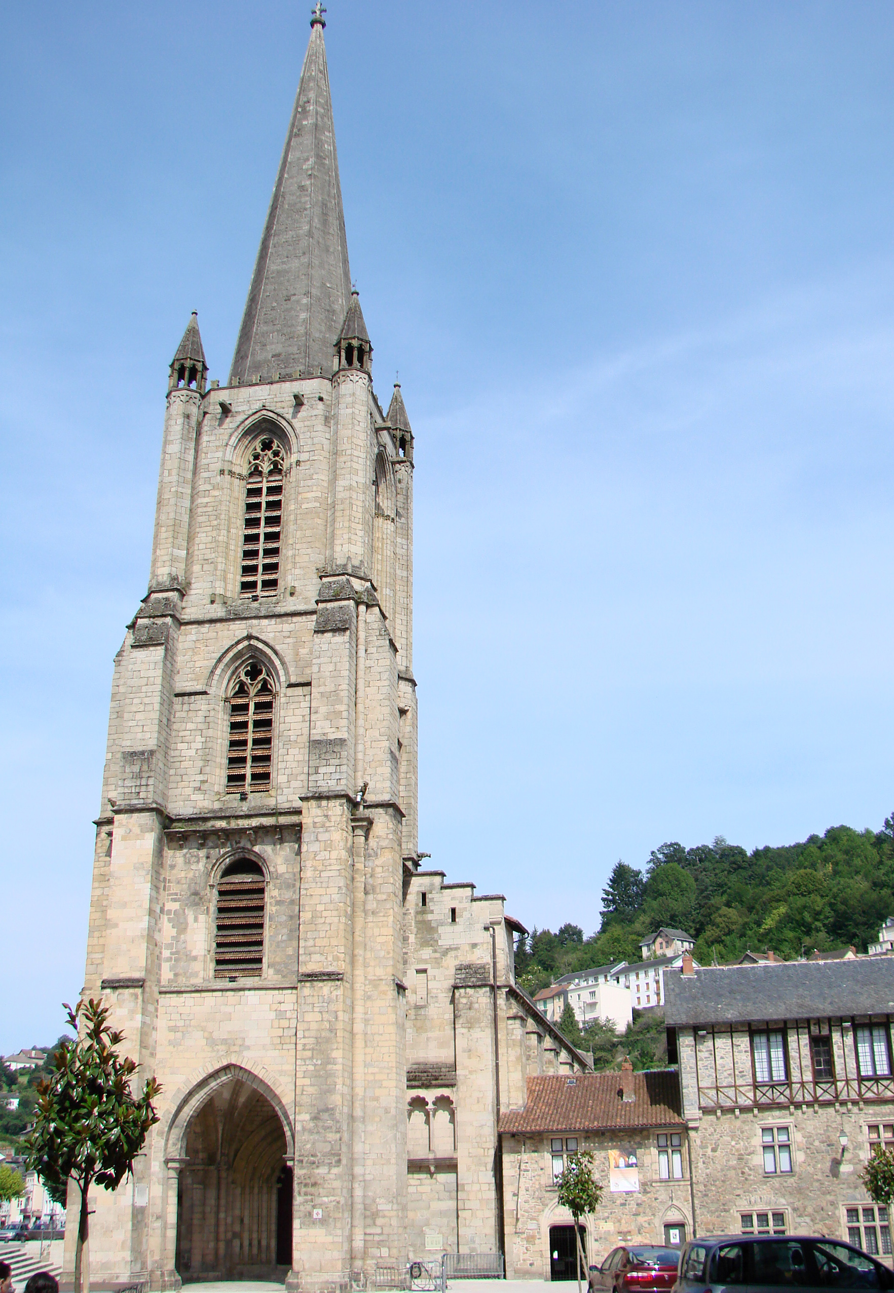 Cathédrale Notre-Dame de Tulle.XIIème siècle.